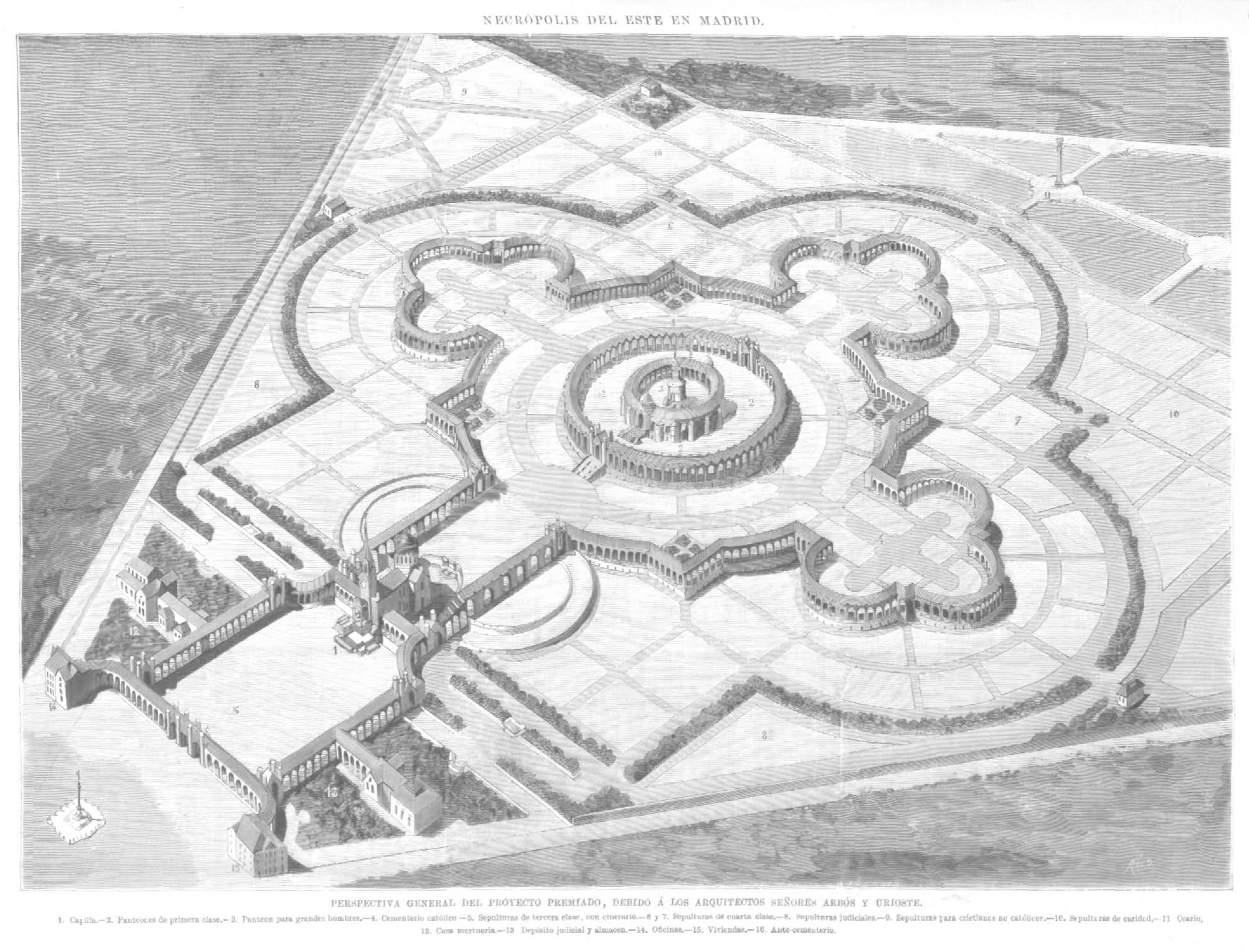 Necrópolis del Este en Madrid. Perspectiva general del proyecto premiado, debido a los arquitectos señores Arbós y Urioste